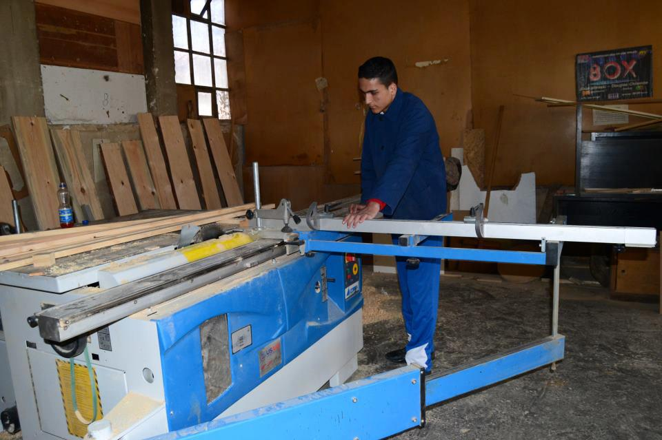 Техничар за мебел и ентериер